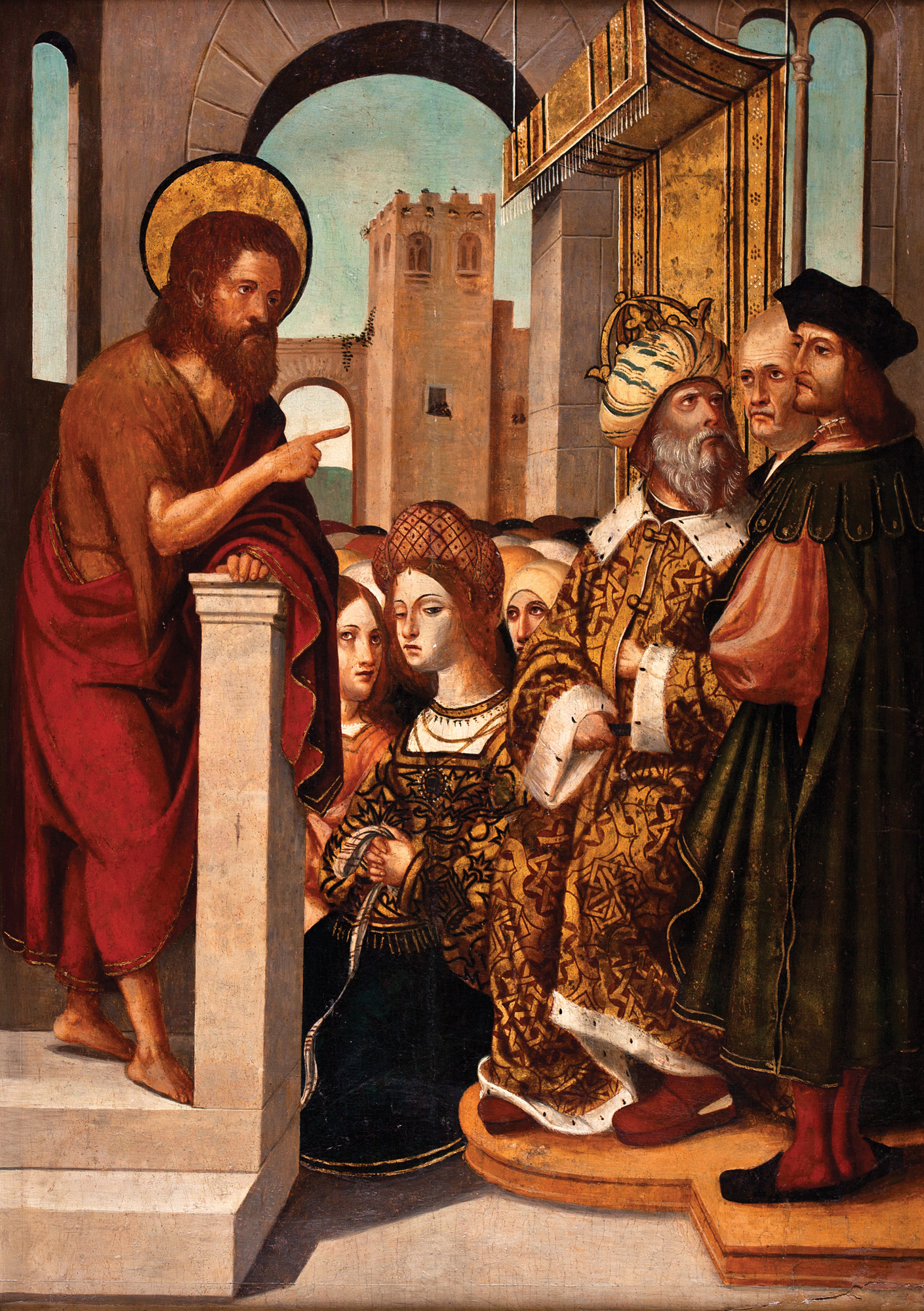 Pere Mates- San Juan denuncia el matrimonio de Herodes. óleo sobre tabla, 87 x 63 cm. Abalarte subastas, octubre de 2016, lote 1220